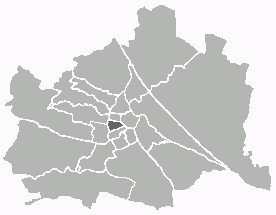 Positionskarte des 7. Wiener Gemeindebezirks Unter Verwendung einer Vorlage von Extrawurst. Public Domain.